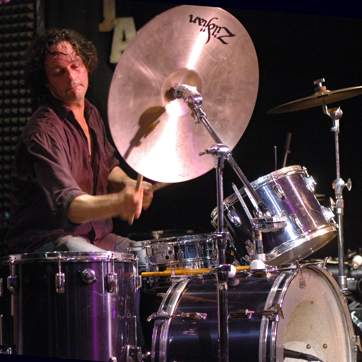 Michael Wertmüller c/o Peter Brötzmann & friends im Schlot, Berlin, Germany Peter Brötzmann (reeds), Mats Gustafsson (reeds), Ken Vandermark (reeds), Conrad Bauer (tb), Johannes Bauer (tb), Marino Pliakas (e-b), Clayton Thomas (b), Michael Wertmüller (dr) Party parallel zum Jazzfest, in Kooperation mit der jazzwerkstatt-berlin-brandenburg e.V. und Ulli Blobel